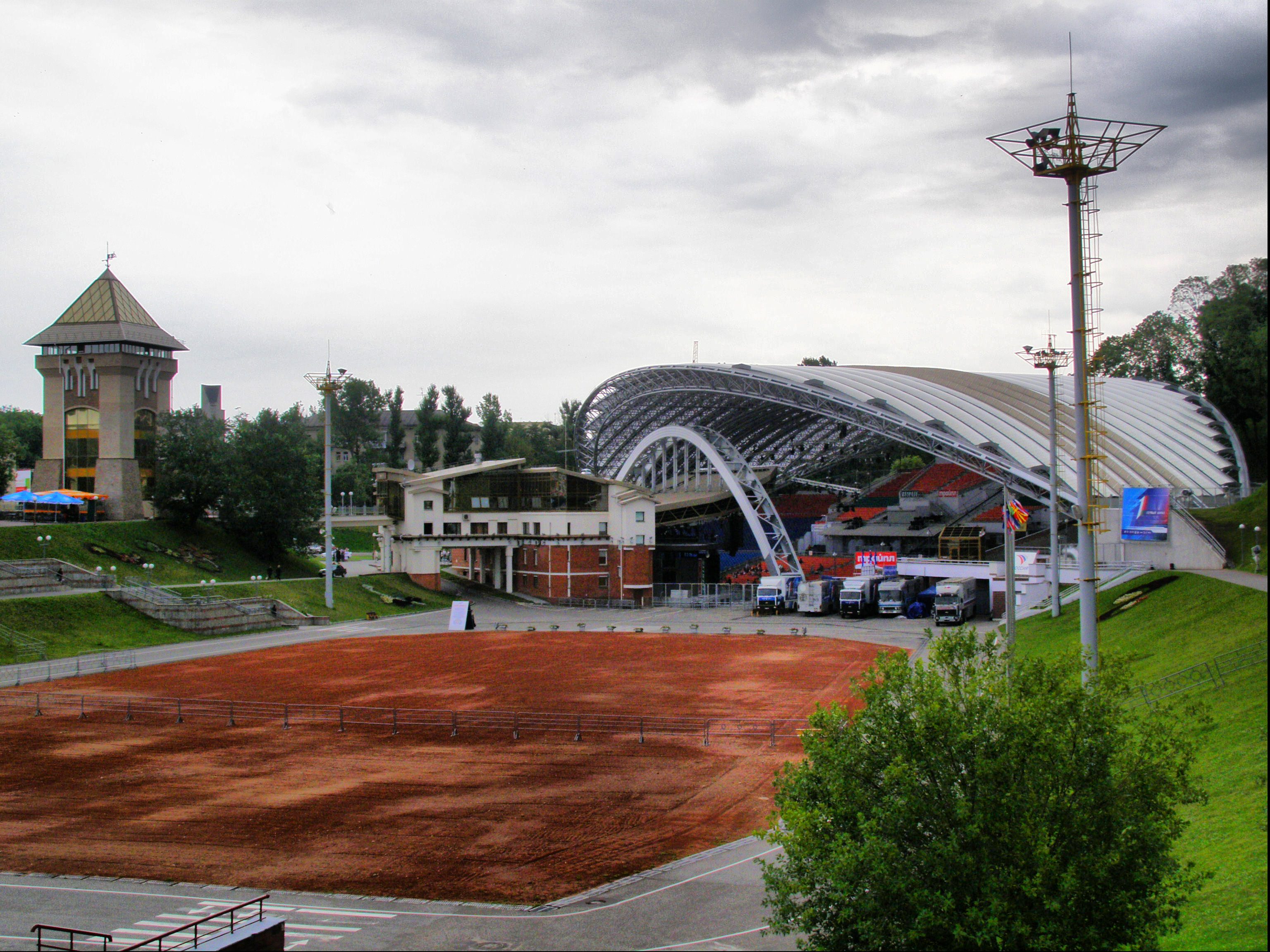 Идея постройки большой концертной площадки под открытым небом возникла в мае 1987 года. Такой зал потребовался для проведения Всесоюзного фестиваля польской песни, предшественника «Славянского базара». Разработкой уникального проекта занялись специалисты организации «Витебскгражданпроект» под руководством архитектора В. А. Бабашкина.